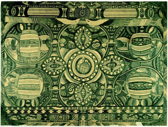 Katholische Geisteszentrale in Rom, 1905. Bleistift auf Zeitungspapier, 74,5 x 99,5 cm; Adolf-Wölfli-Stiftung, Kunstmuseum Bern